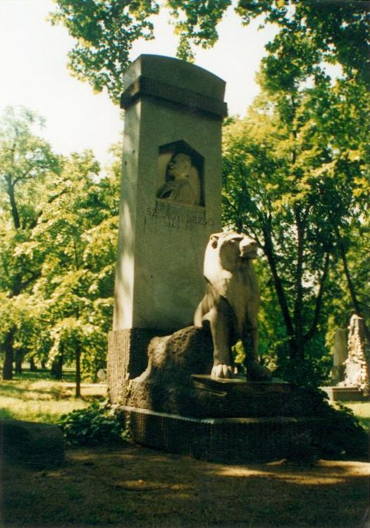 Szilágyi Dezső síremléke (készítette: Stróbl Alajos) 1908 óta áll a budapesti Kerepesi úti temetőben, a Deák-mauzóleum szomszédságában.